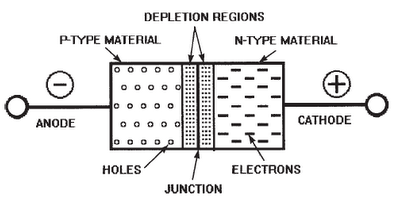 Fig.2-Për cdo elektron i cili përhapet përmes lidhjes pn dhe kombinohet me një vrimë,mbetet një ngarkesë pozitive(vrimë) në regjionin n,dhe një negative(elektron) krijohet në regjionin p,duke formuar barrierë potenciali.Kjo vazhdon të ndodhë derisa tensioni i barrierës largon difuzionin.